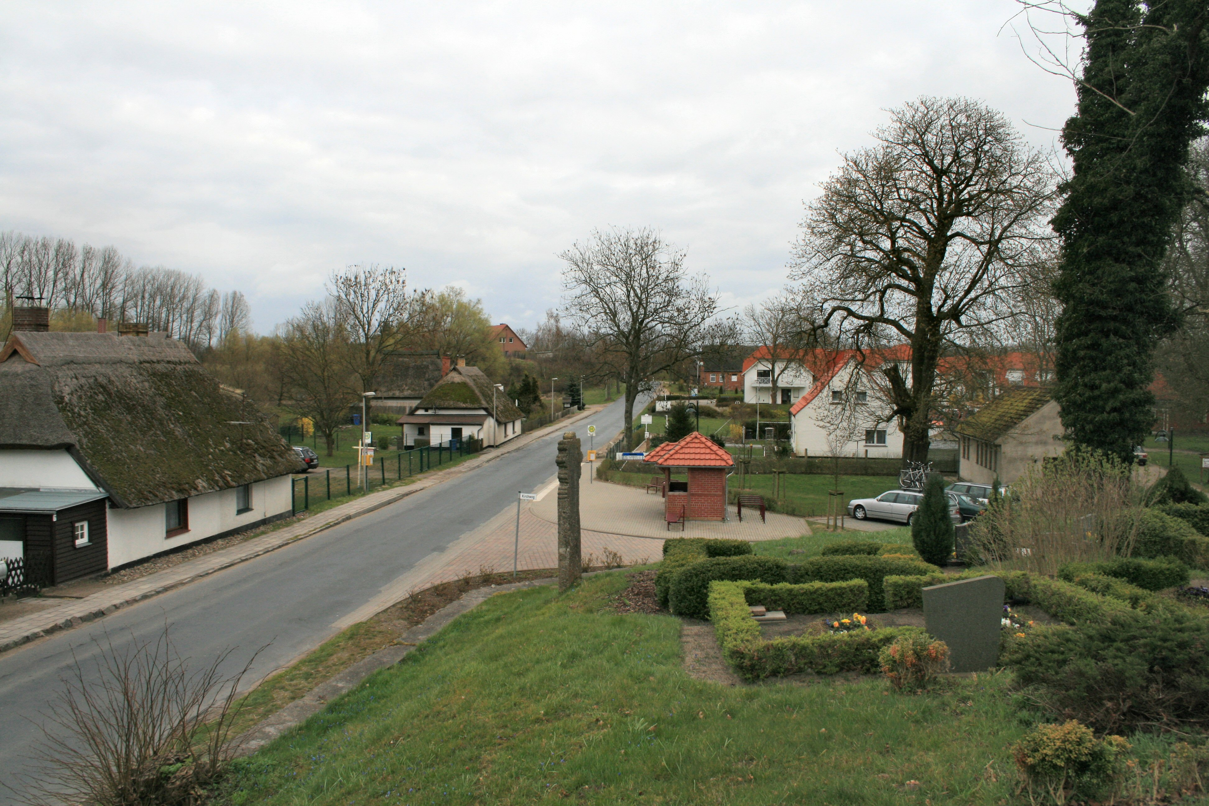 Teilansicht von Gustow auf Rügen mit dem 2,50 Meter hohen Sühnestein (Mordwange) von 1510 am Abhang zur Kirchhofmauer